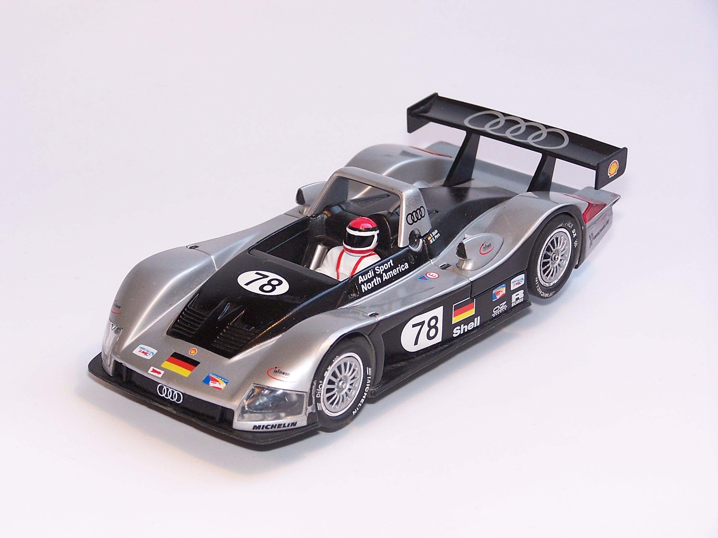 A typical slotcar (Carrera Audi R8)